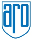 Logo der Auto România